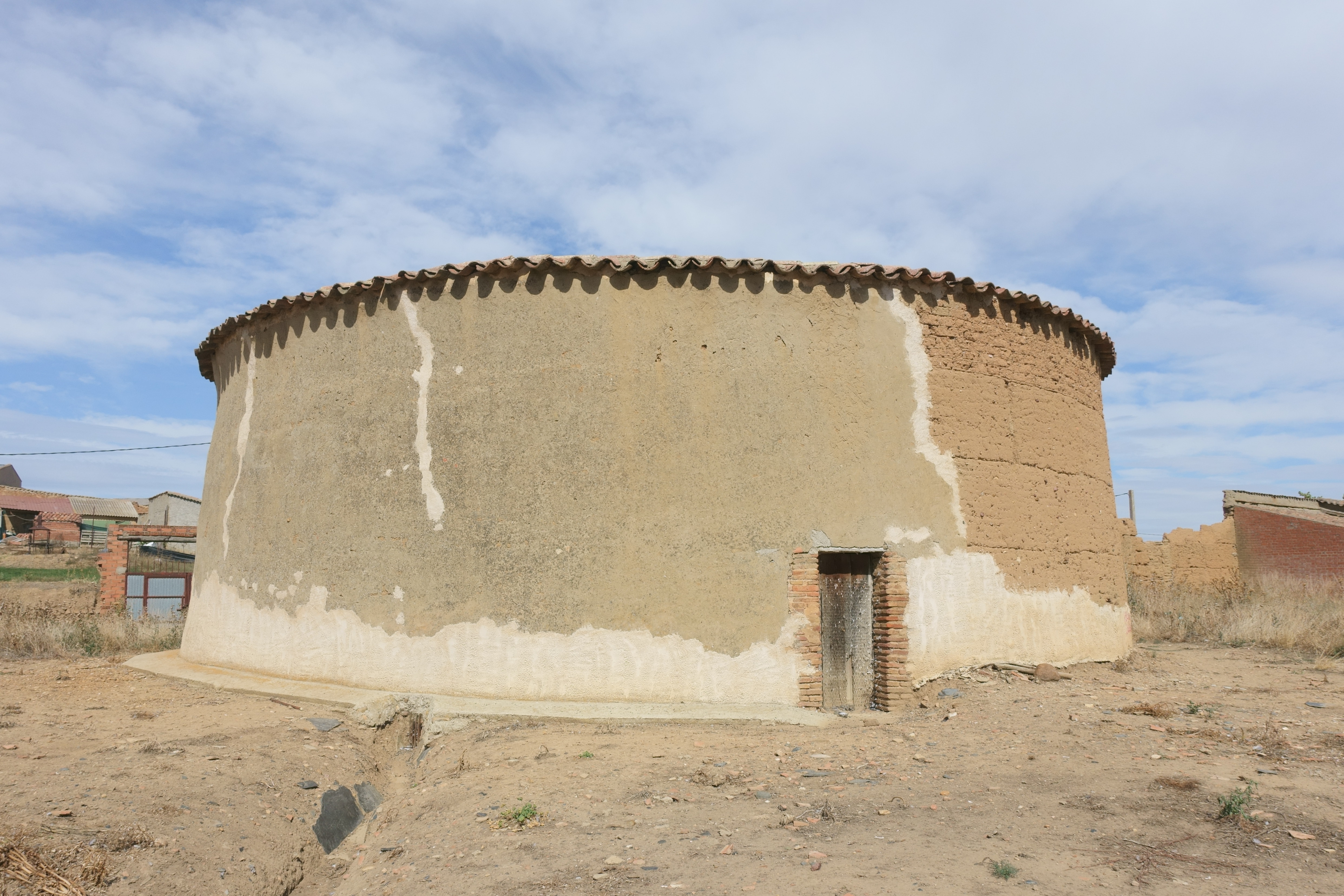 Palomar en Castronuevo (Zamora, España).